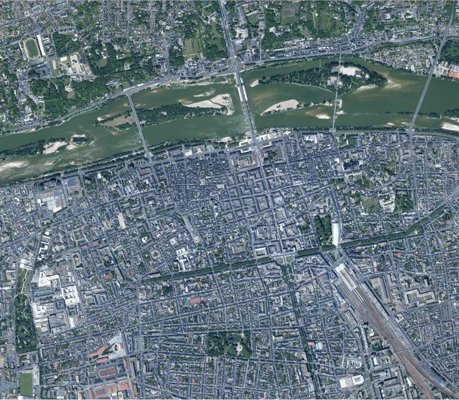 Tours vue du ciel